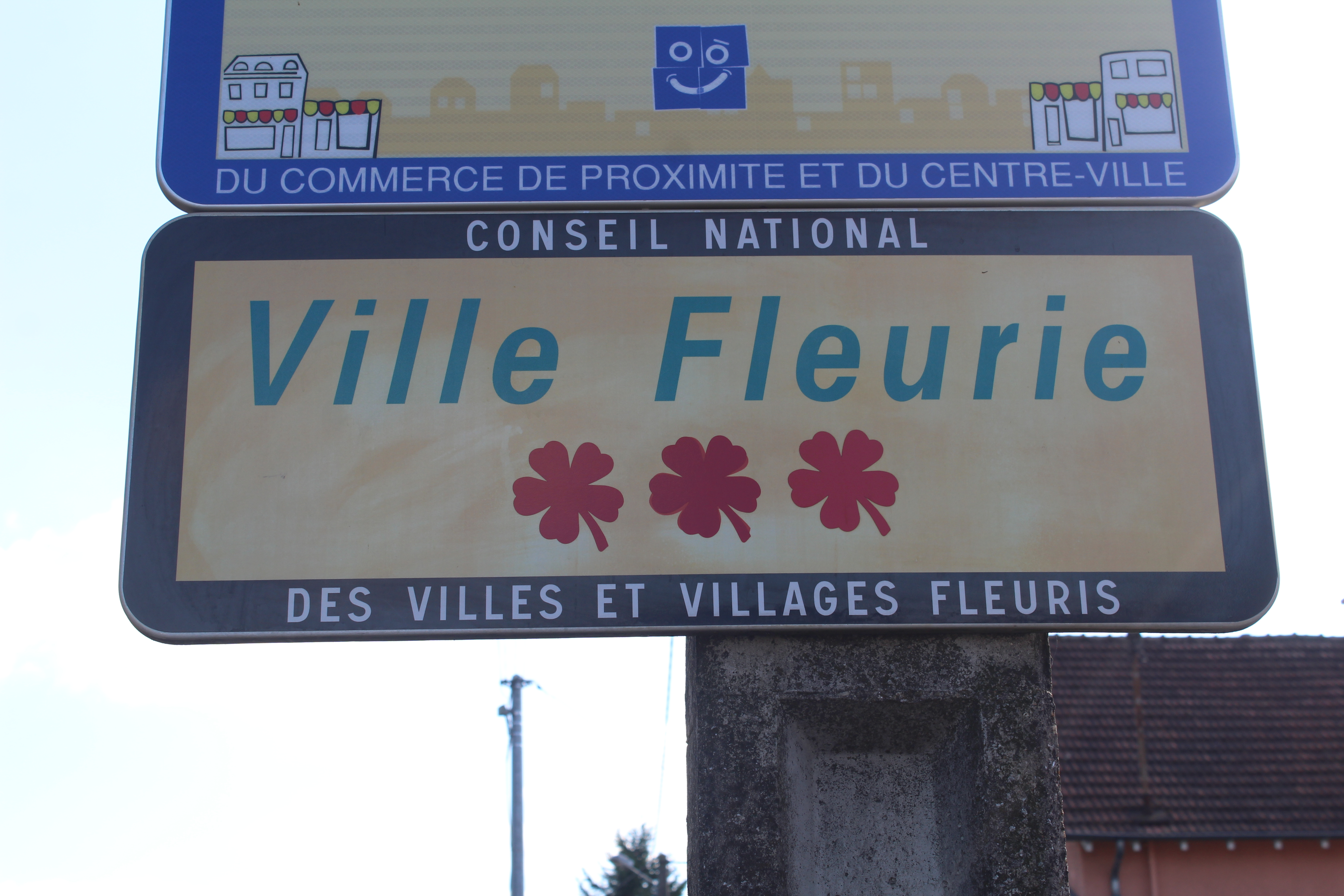 Panneaux Commerces Proximité et Ville Fleurie avec trois fleurs à Charnay-lès-Mâcon.